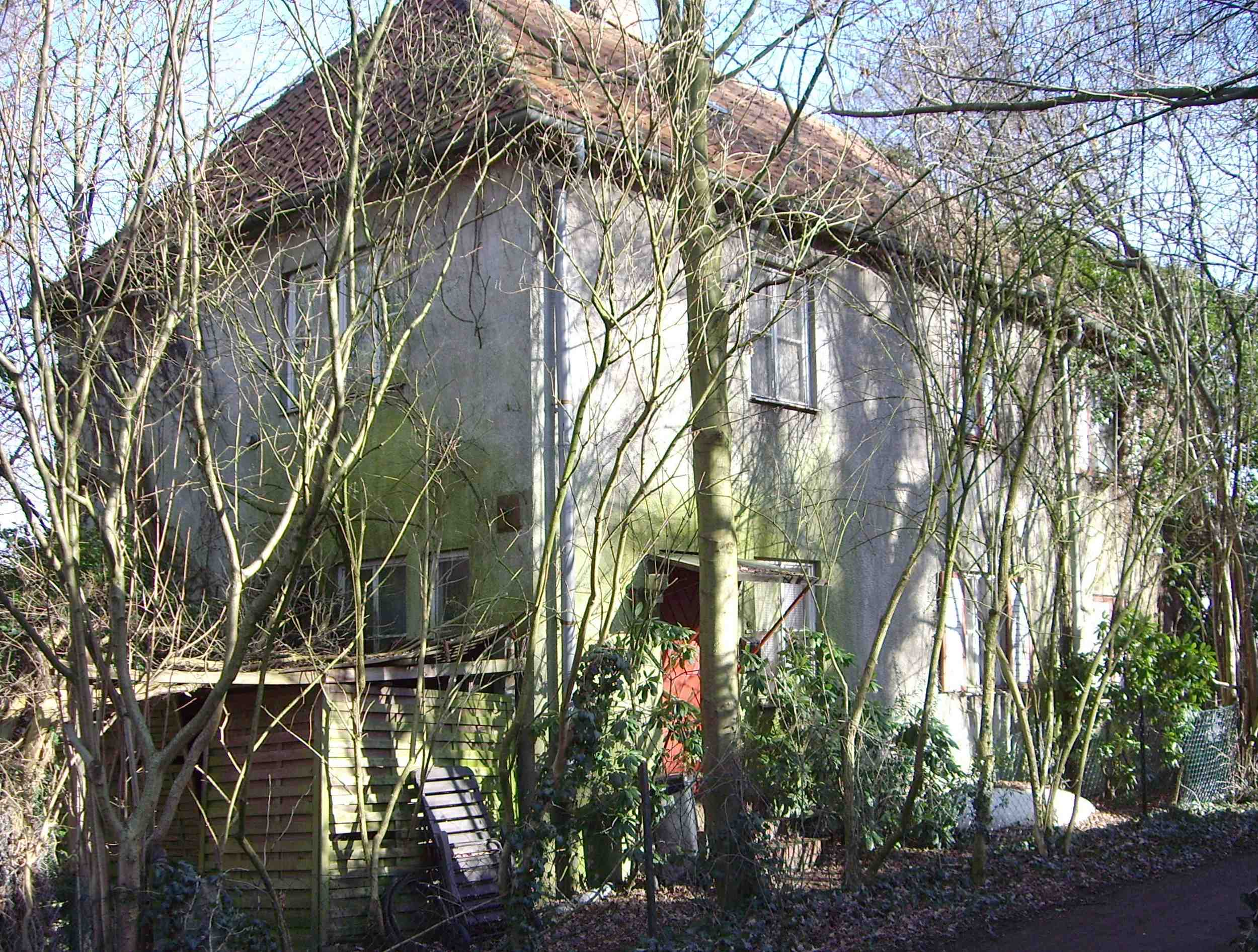 Wohnhaus von Heinrich Focke, erbaut 1959 als erstes Fertighaus nach der Methode Messerschmitt, heute leider in sehr schlechtem Zustand